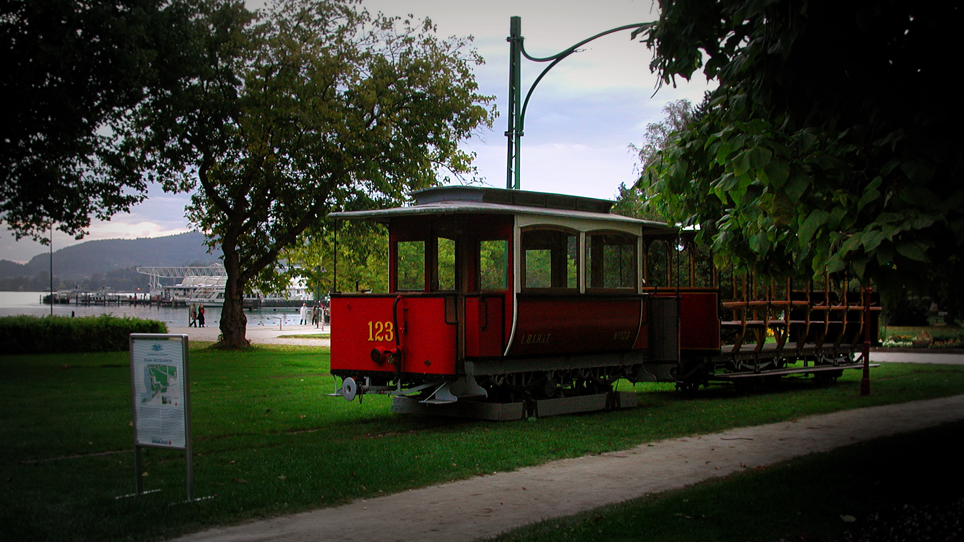 Beginn des Projekts "Seetramway" in Klagenfurt am Wörthersee.